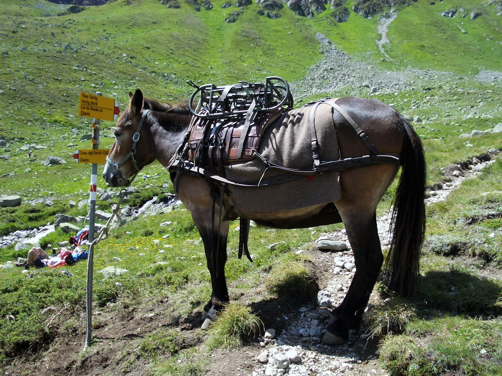 Maultier Val Funtauna GR, Schweiz